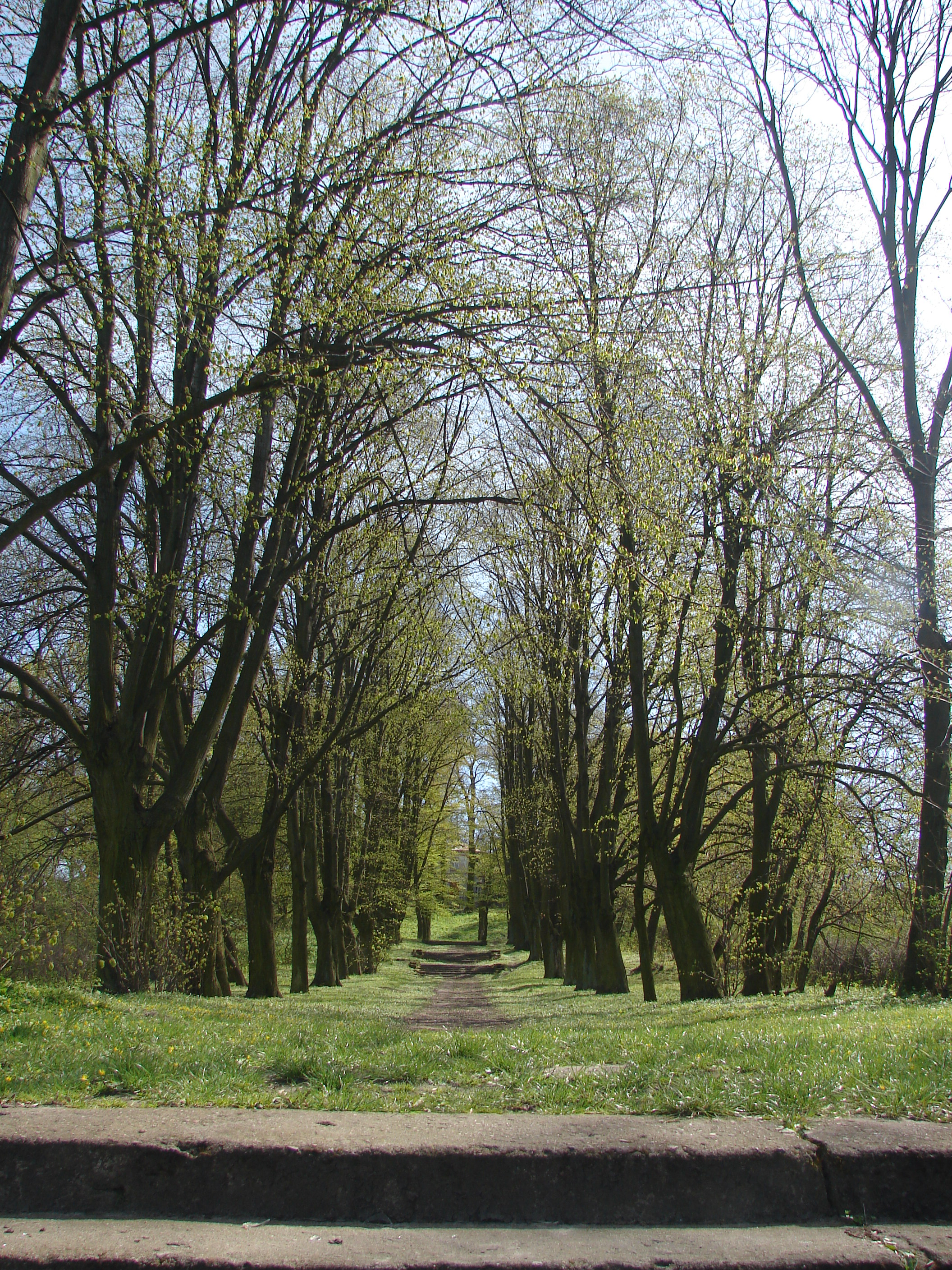 XIX-wieczny zespół dworski w Steklinie - aleja główna